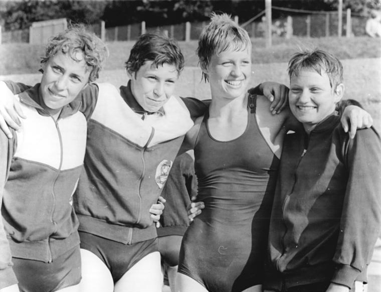 Marlis Pohl, Karin Tülling, Christine Strübing, Karin Höpfner Zentralbild Liebers 11-7-70-XXI. DDR-Meisterschaften im Sportschwimmen im neu eröffneten Volksbad von Brandenburg-Havel (am 10.7.70)-Für eine Überraschung am 3. Wettkampftag sorgten diese glücklichen Mädchen des SC Empor Rostock. Über 4 x 100 m Freistil siegten sie in 4:14,8 min vor der Staffel des SC DHfK Leipzig (Titelverteidiger). V.l.: Marlis Pohl, Karin Tülling, Christine Strübing und Karin Höpfner.